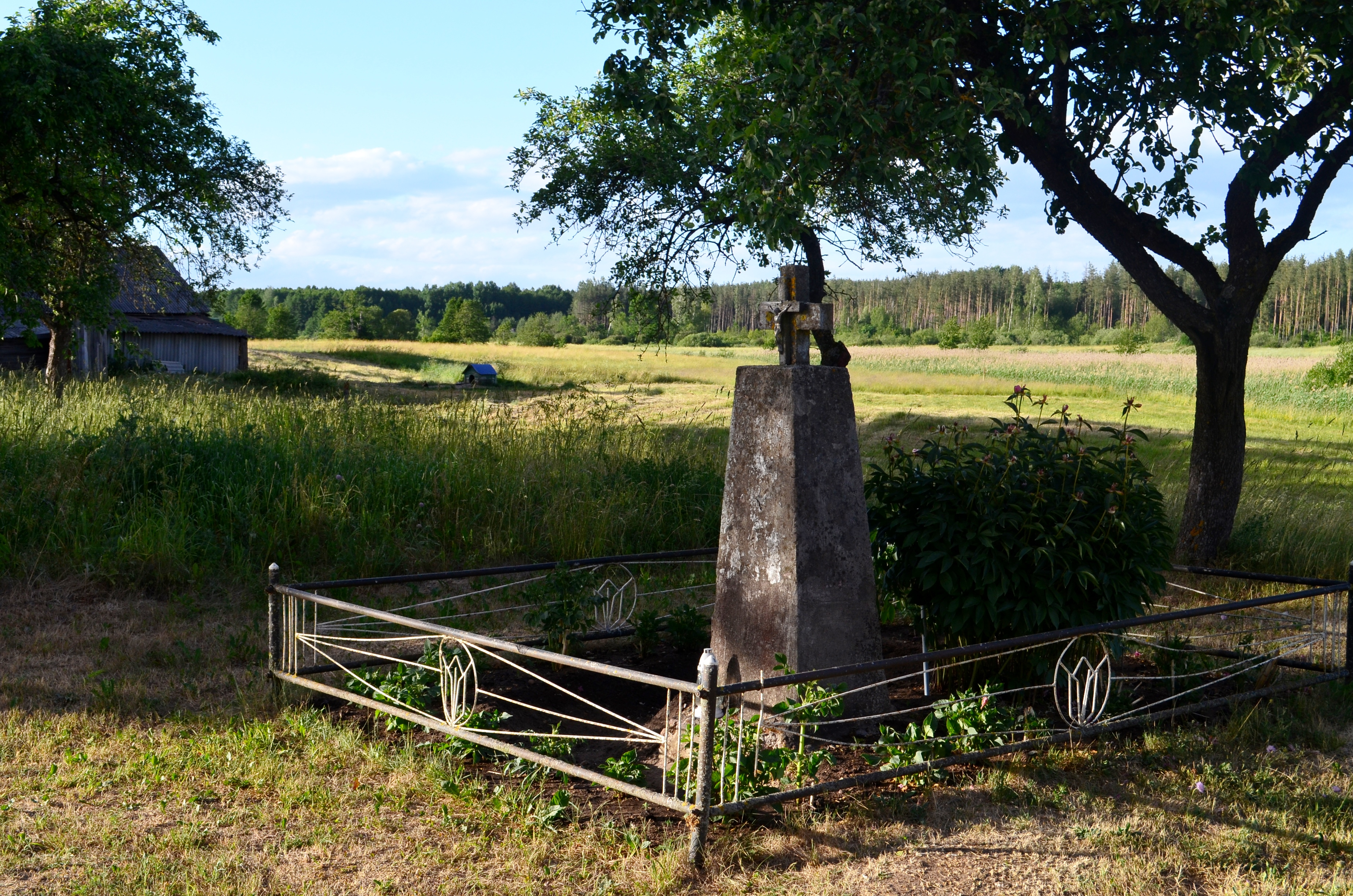 Mikniūnų kryžius, Varėnos raj.